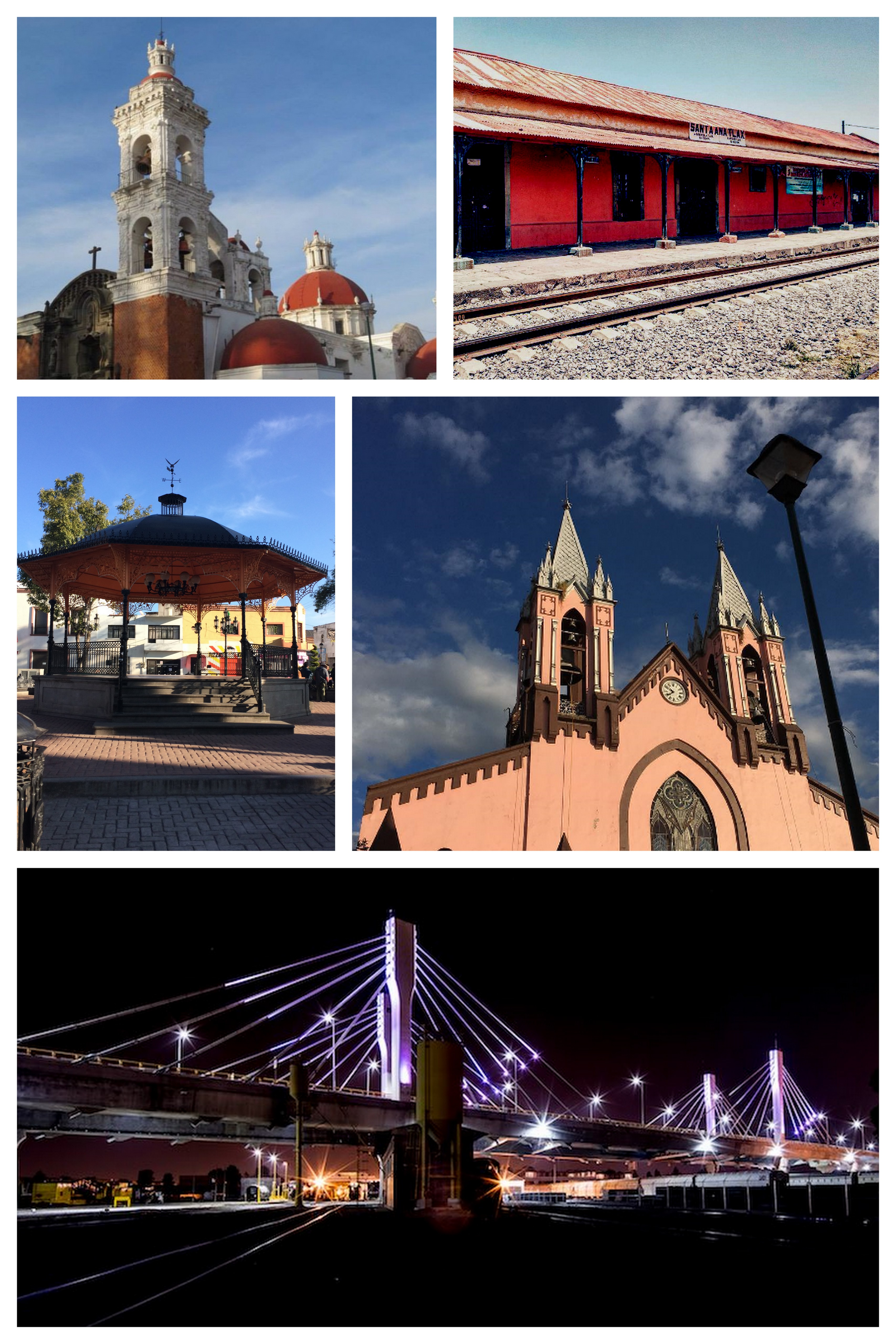 Montaje creado a partir de cinco imágenes en Wikimedia Commons: File:Quisco de Santa Ana.jpg ( CC-BY-SA-2.0) File:Estación de tren.jpg (CC BY-SA 4.0) File:Parroquia de Santa Ana Chiautempan.jpg (CC BY-SA 4.0) File:Puente de Santa Ana Chiautempan.jpg (CC-BY-SA-2.0) File:Parroquia de nuestra señora del Carmen.jpg (CC BY-SA 4.0)